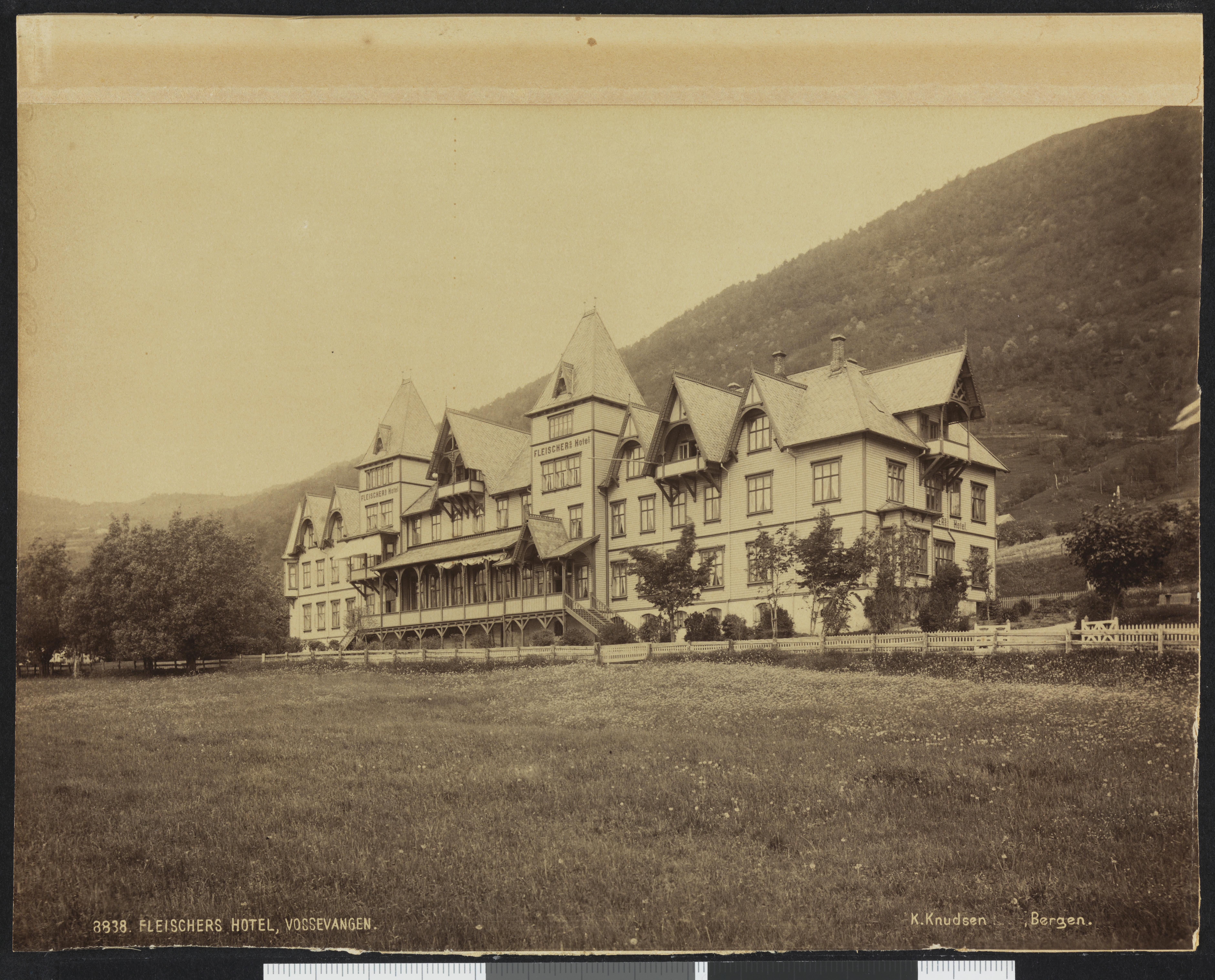 Bildet er hentet fra Nasjonalbibliotekets bildesamling Voss, Hordaland